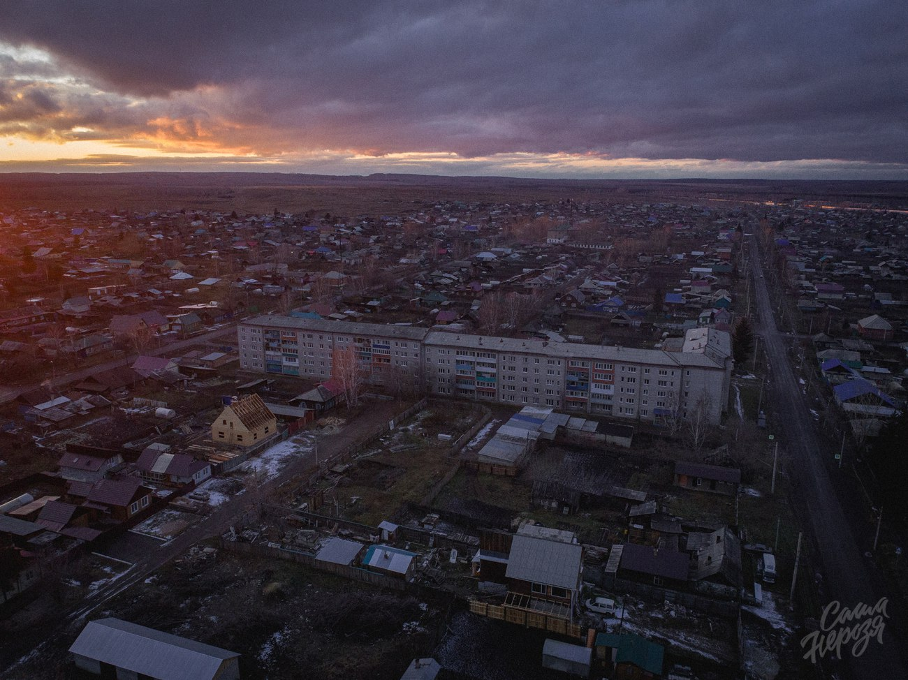 Закат над центром города осенью